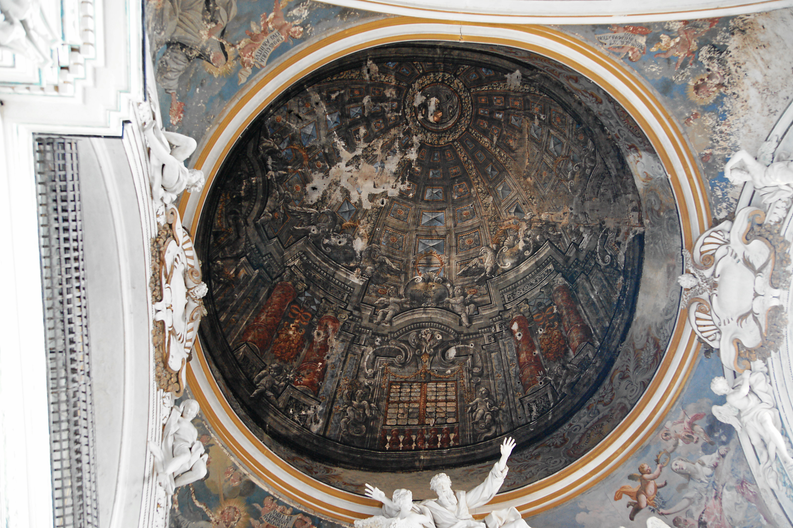 Agrigento: Chiesa di Spirito Santo - Trompe l'Oeil - Kuppel